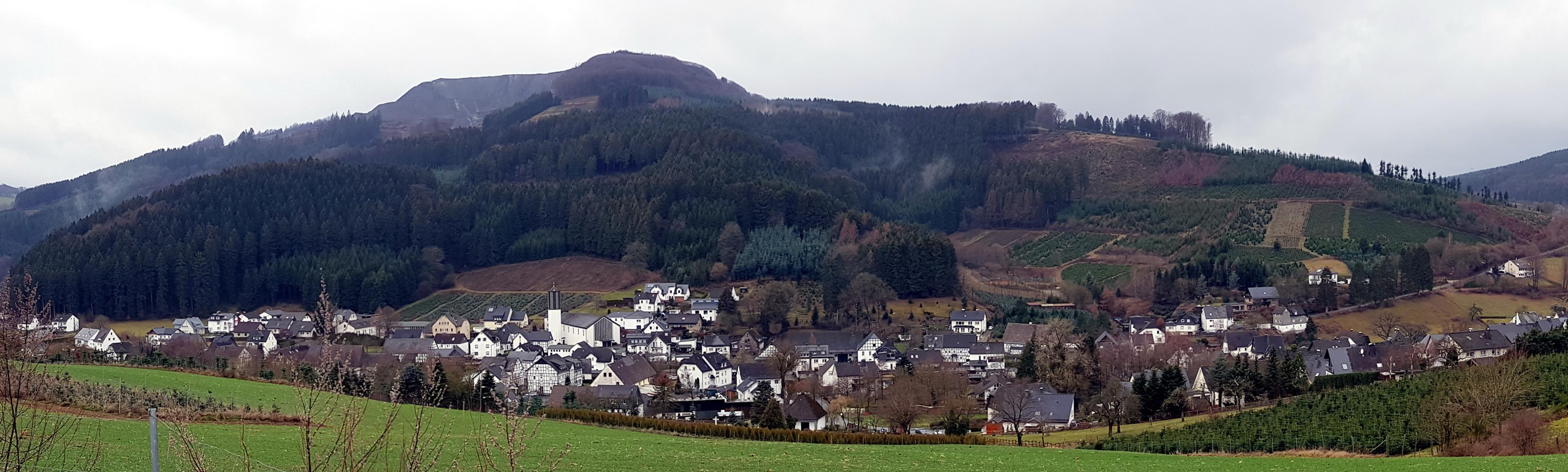 Dorfansicht von Heringhausen vom Kreuzberg aus